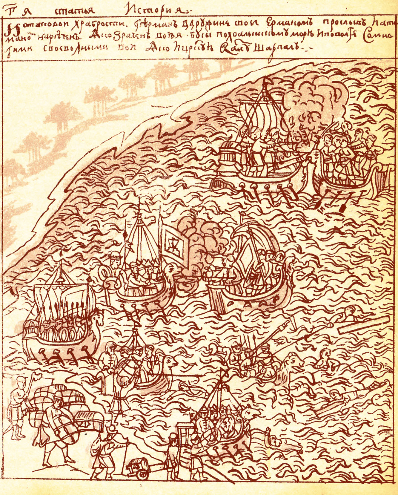 Ермак и ермаковы струги. Детали миниатюры из Ремезовской летописи. Статья 3